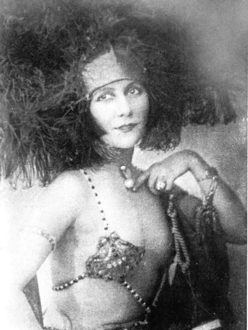 L'attrice e danzatrice Stacia Napierkowska - immagine del 1914